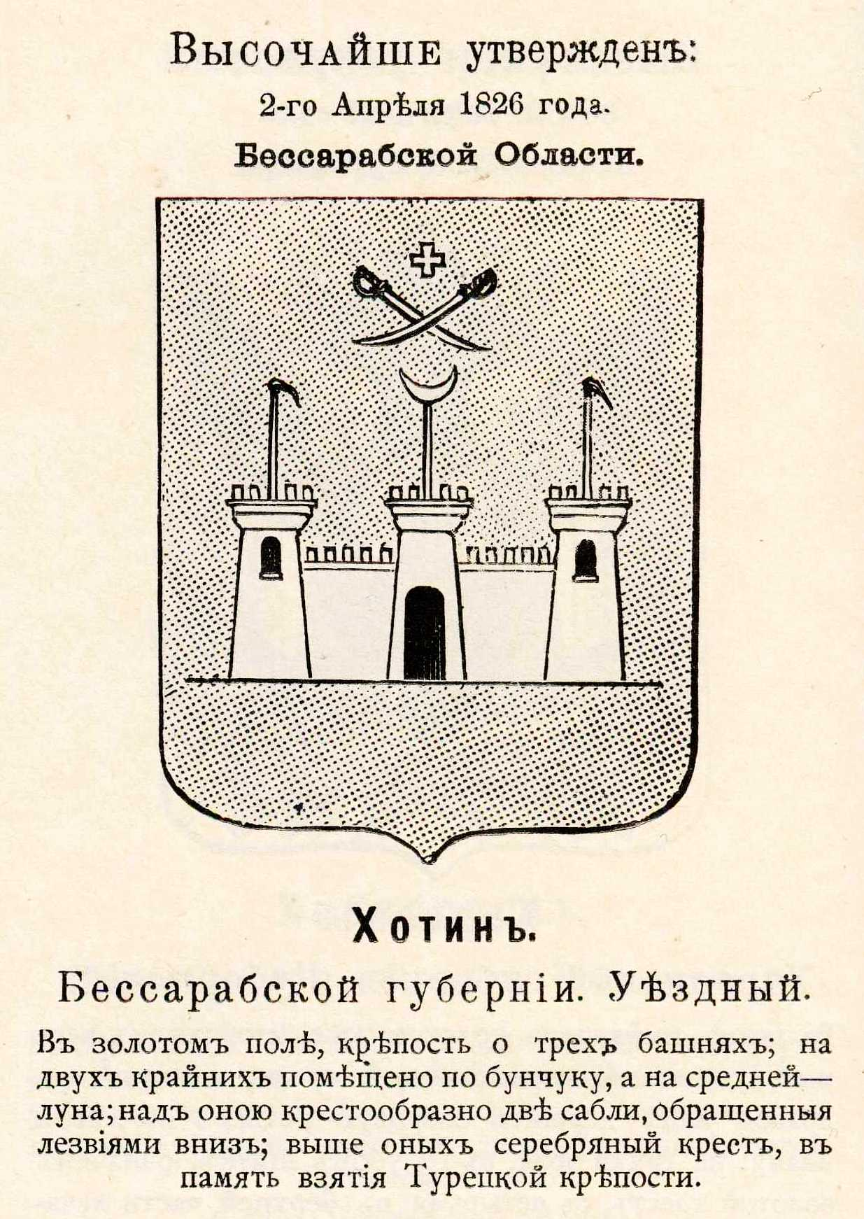 Official Russian Empire coat of arms Hotin. Гласный герб (литера Х из сабель) Российской Империи уездного города Хотин Бессарабской губернии с официальным описанием в Гербовнике Винклера.